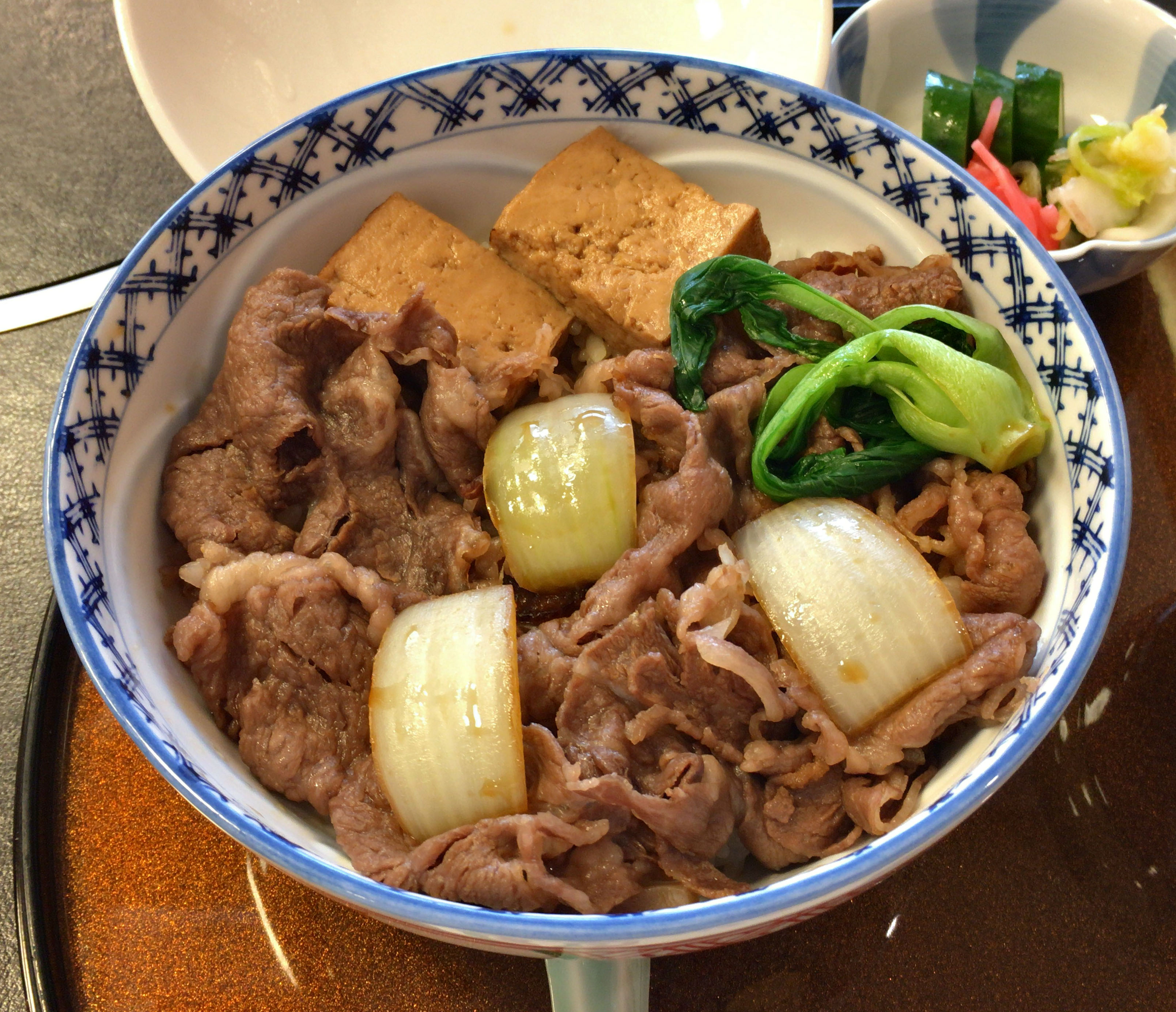 浅草今半 百年牛丼（1620円）